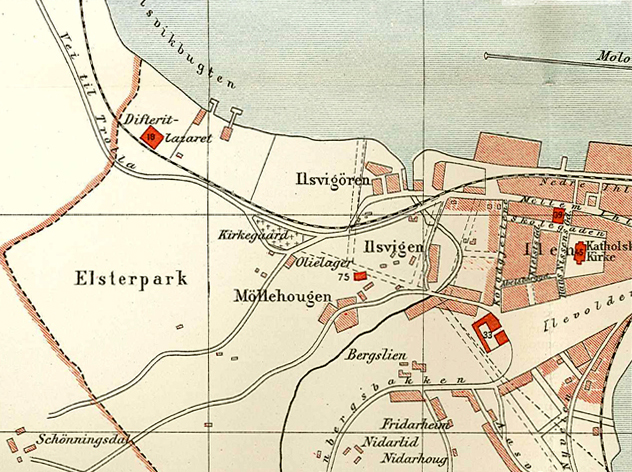 Kart over Ilsvika, Trondheim, 1898